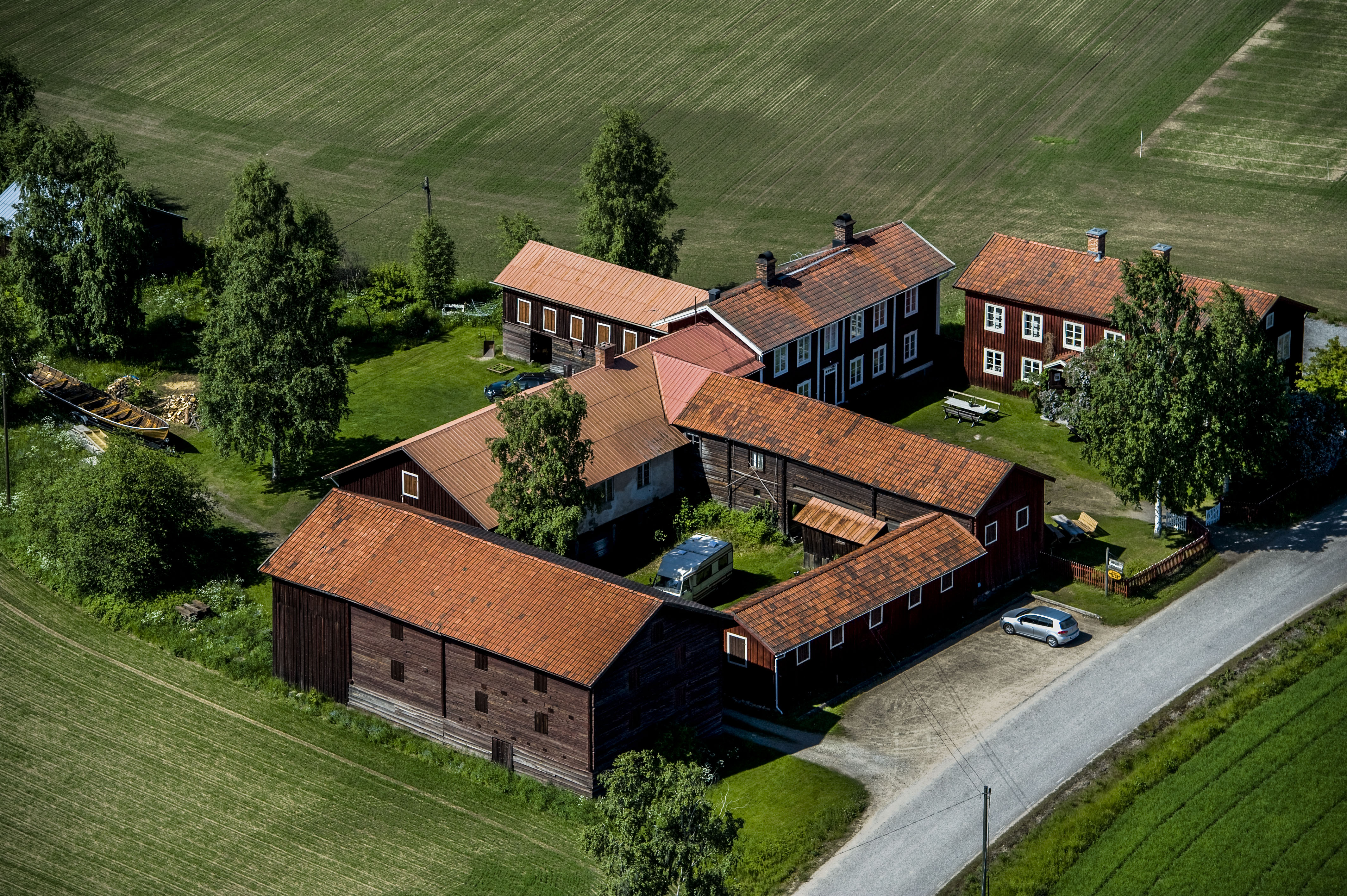 Gästgivars från luften